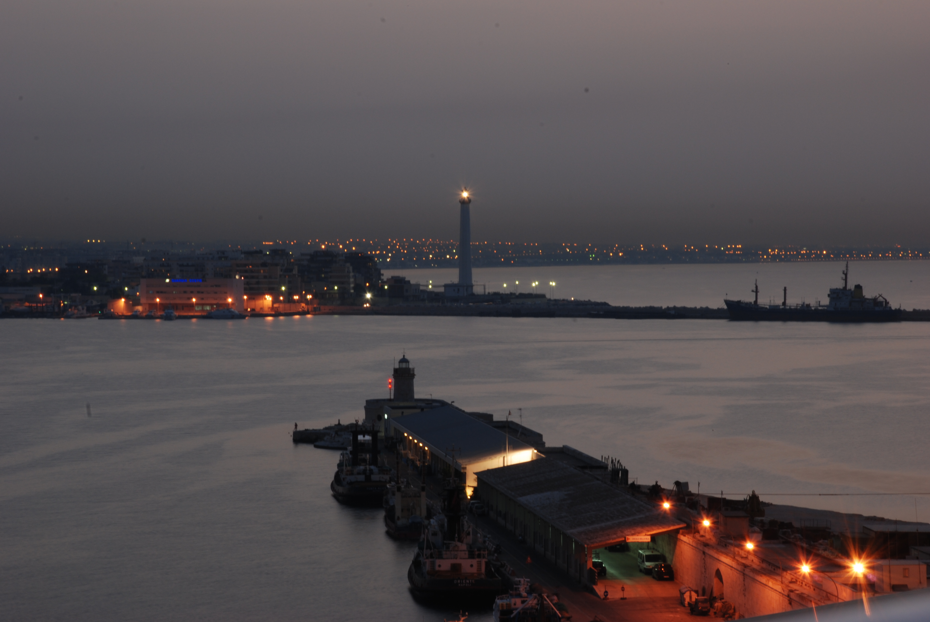 Visuale notturna del porto di Bari